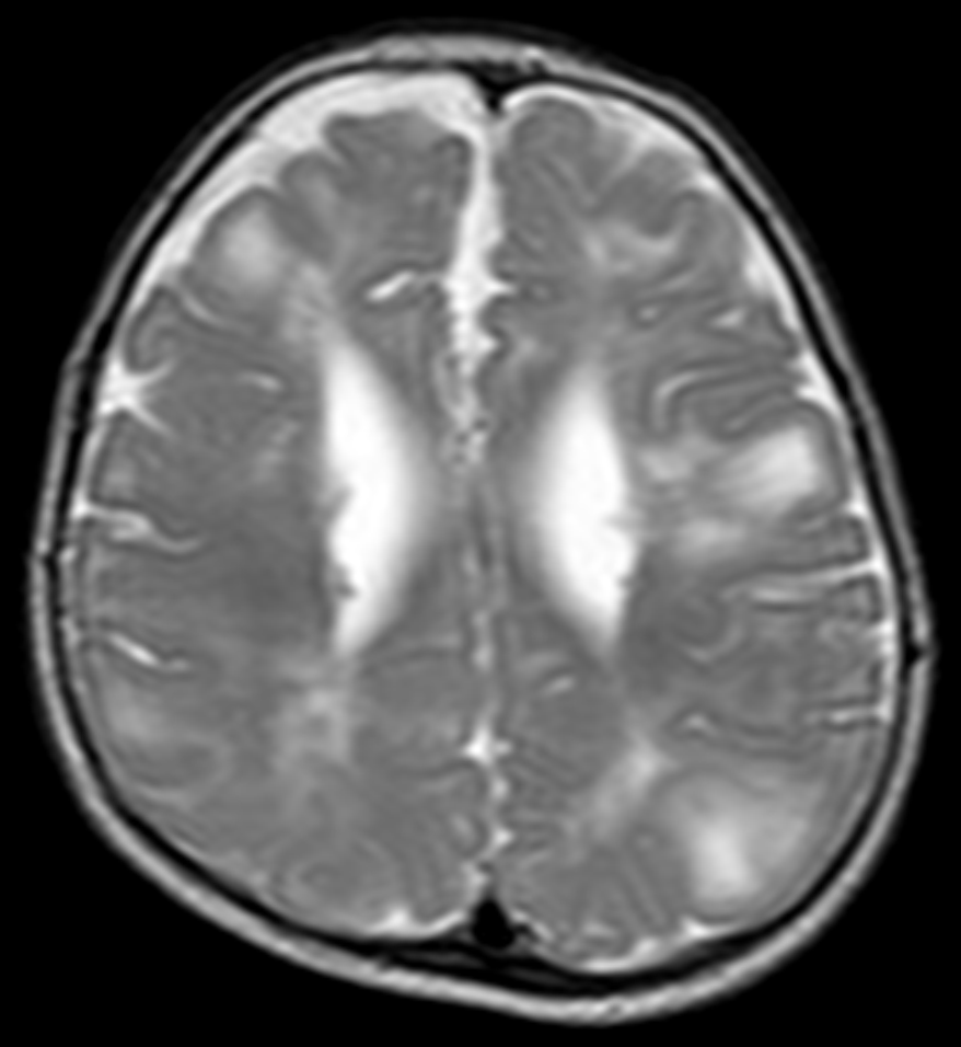 Tuberöse Sklerose in der MRT: Hamartome (Tubera) subkortikal und subependymale Knötchen. T2 axial